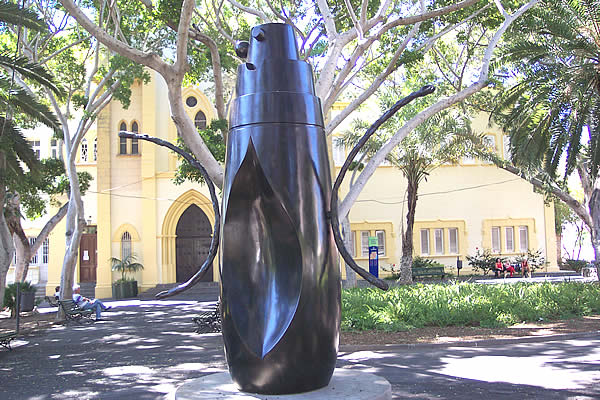 Femme Bouteille, escultura de Joan Miró. Situada en el Parque Viera y Clavijo.